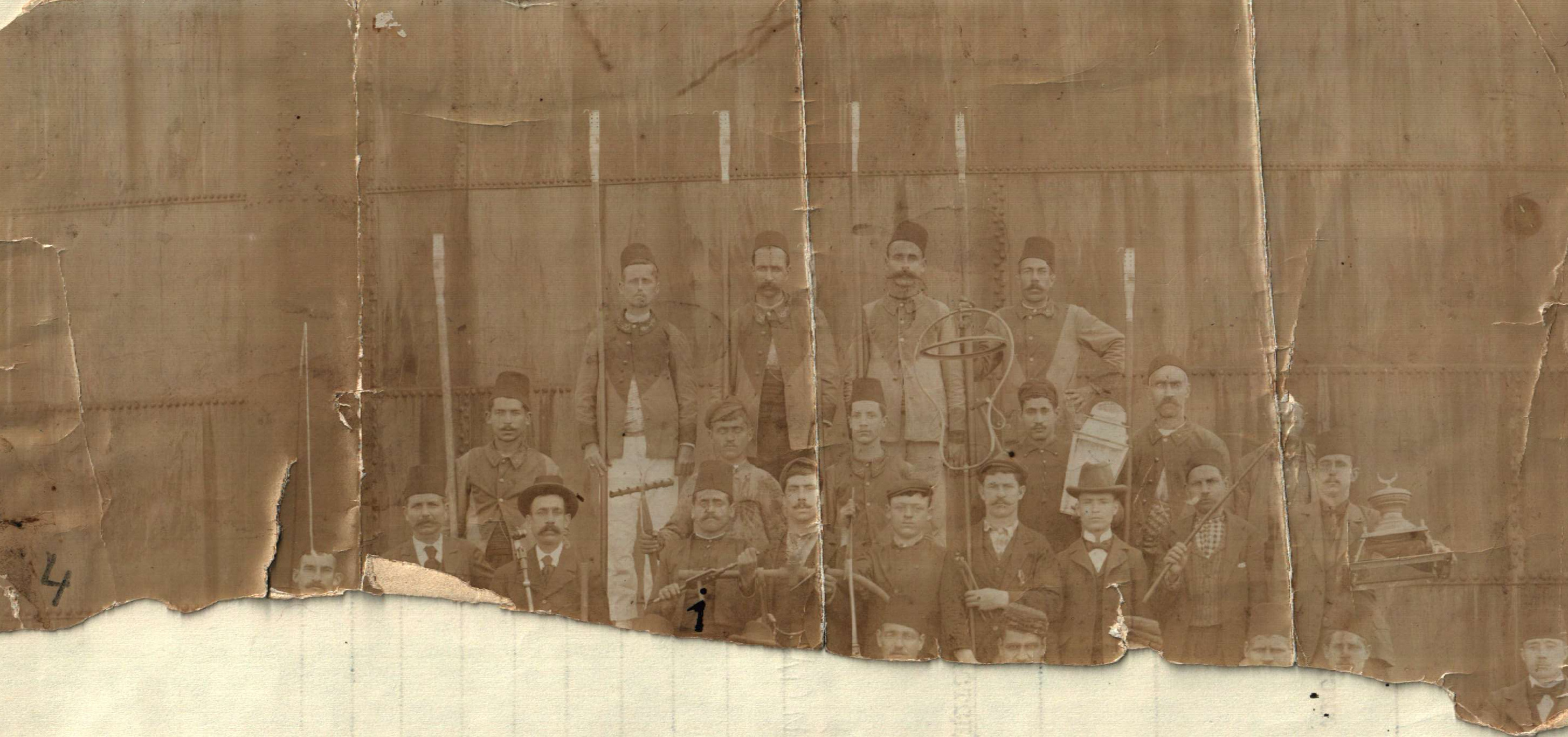 Снимка на Атанас Костадинов Ковачев (мангъра) - с № 1. Даме Груев - последния ред, втория от ляво на дясно с други дейци на Солунския революционен комитет в Солун, есента на 1906 г.